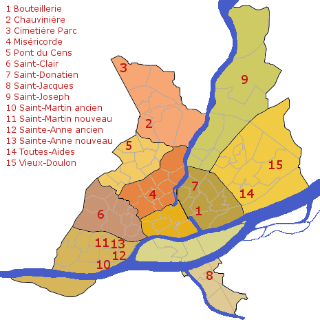 Nantes (France) - Carte d'implantation des cimetières